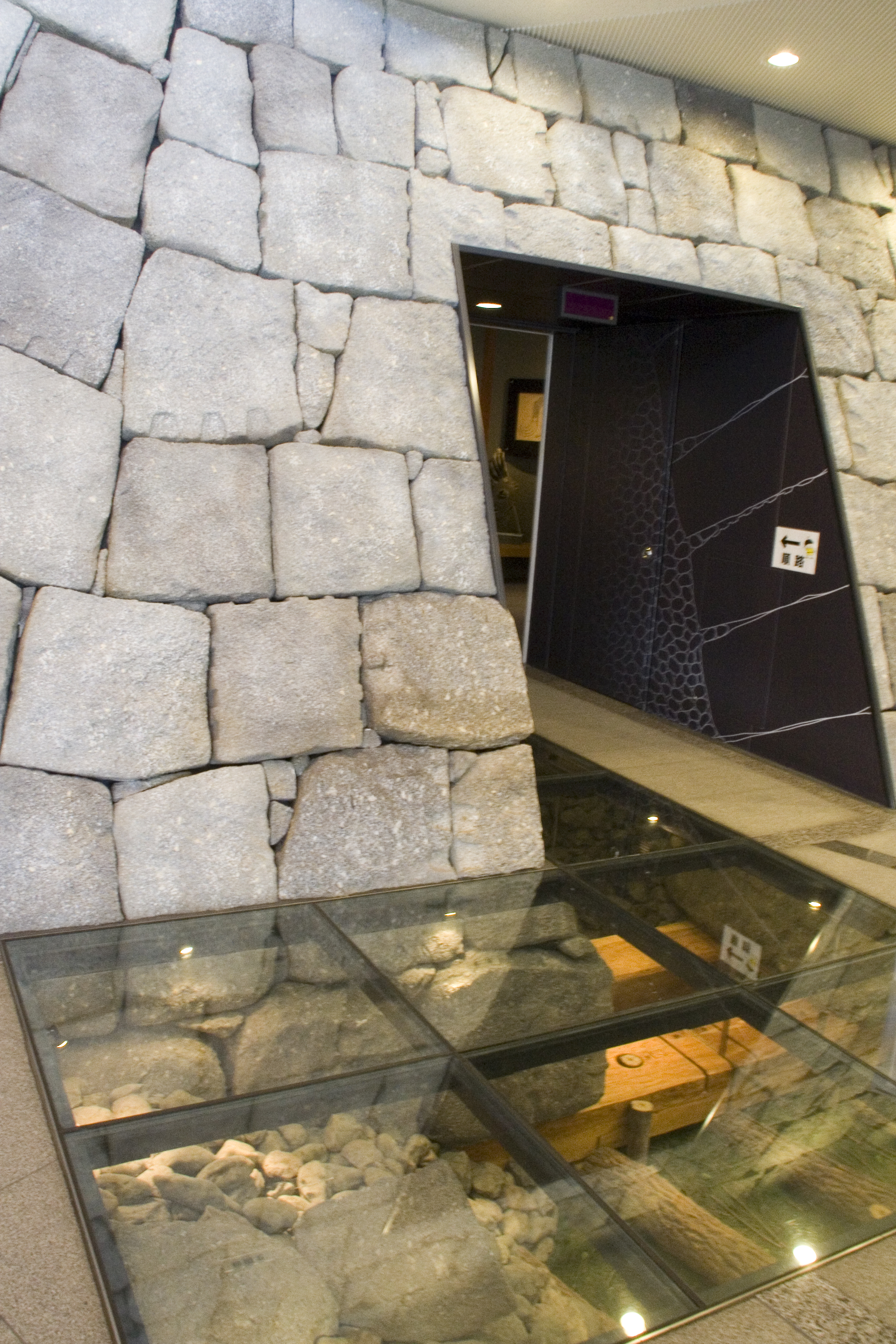 高槻市立しろあと歴史館 ロビーの城壁